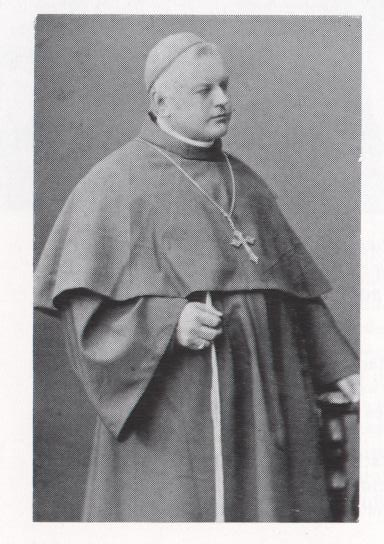 Bischof Fidelis Dehm OFM, Apostolischer Visitator des Apostolischen Vikariats Moldau, Rumänien, + 1883